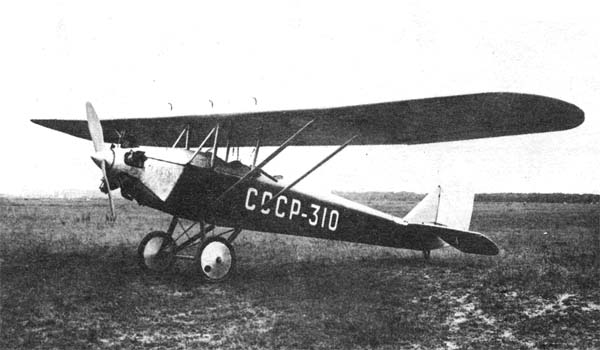 Jakovlev AIR-3